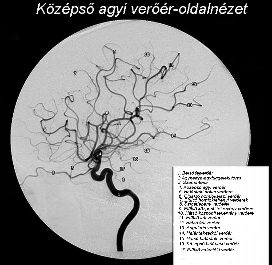 Középső agyi verőér - oldalnézet